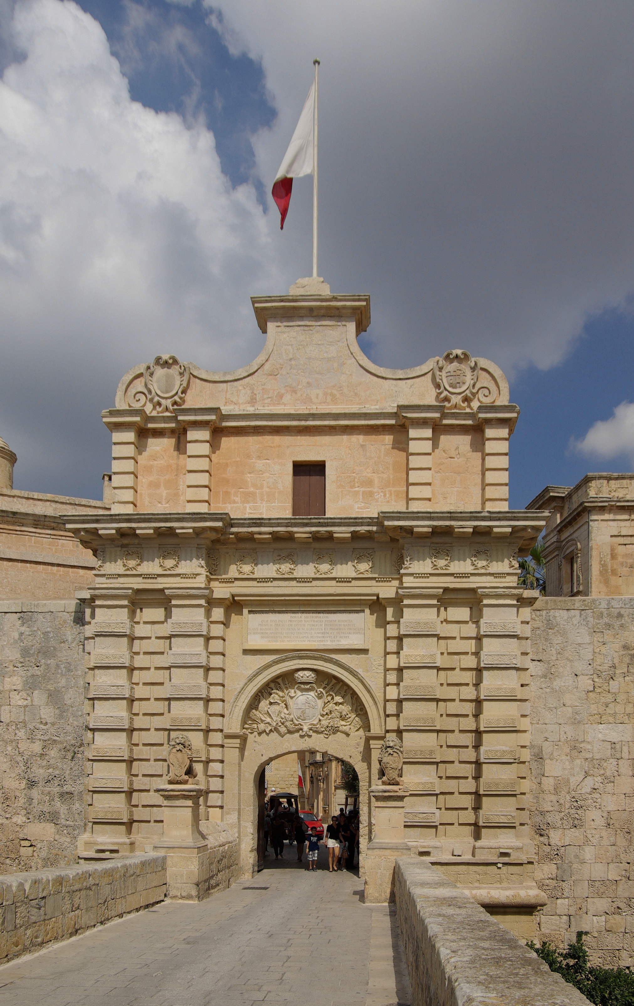 Malta, Mdina, Main Gate